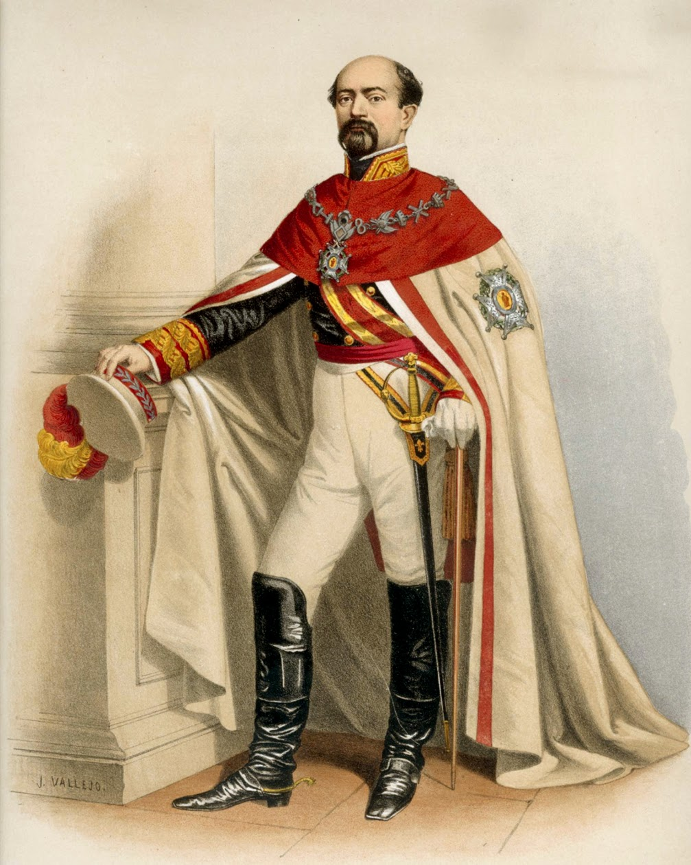 Litografía en color del siglo XIX que representa al general Manuel Pavía y Lacy (1814-1896), marqués de Novaliches, revestido con el traje ceremonial y el manto de la Real y Militar Orden de San Fernando, conocida popularmente como Cruz Laureada de San Fernando. El general Manuel Pavia fue además senador del Reino y caballero de la Orden del Toisón de Oro y falleció en Madrid en 1896. La litografía procede del libro Historia de las Órdenes de Caballería y de las condecoraciones Españolas, escrito por José Gil de Dorregaray y Antonio Benavides Fernández de Navarrete, que fue publicado en 1864.